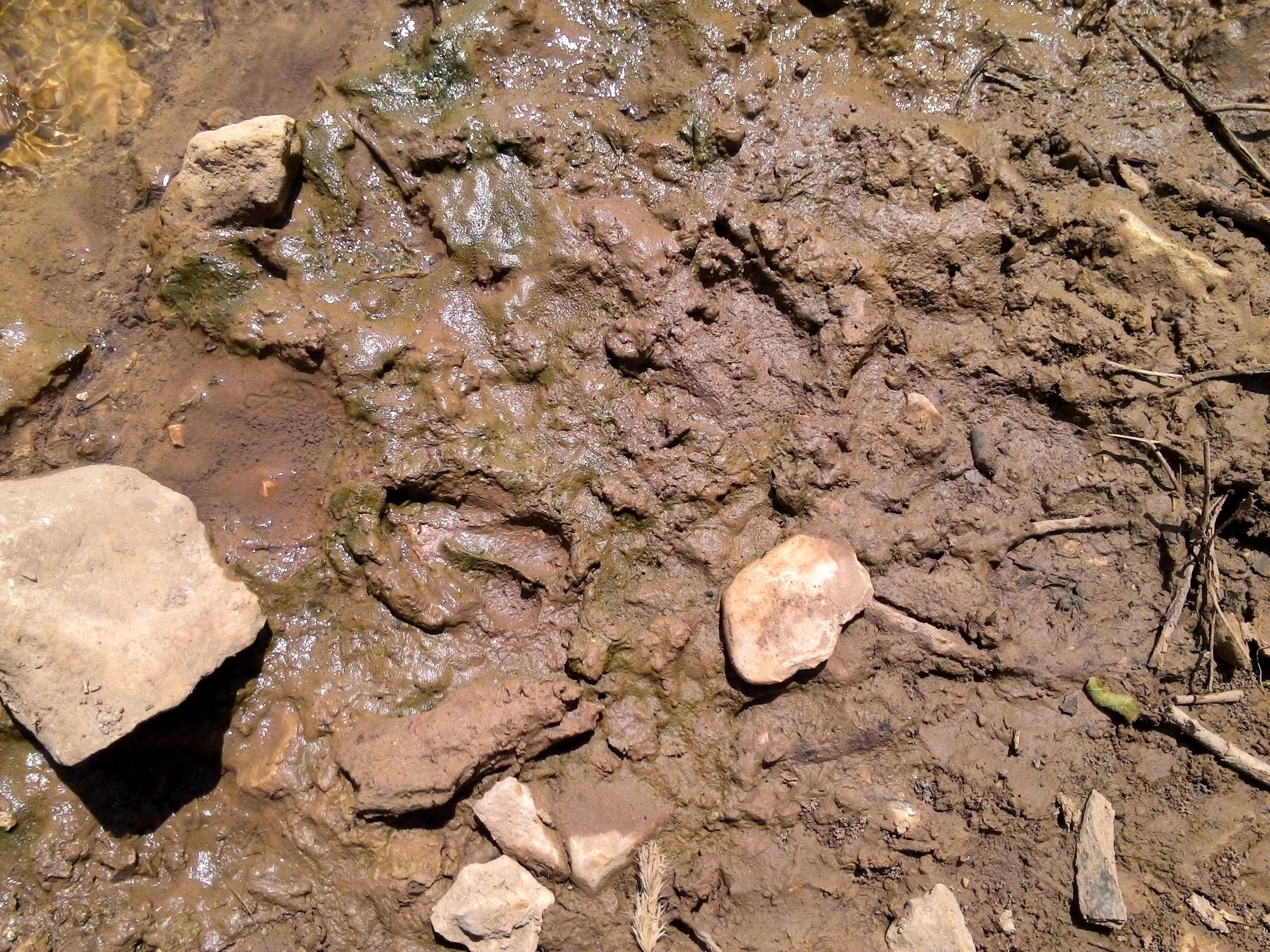 עקבות חזיר בר- צילם מתן ממן